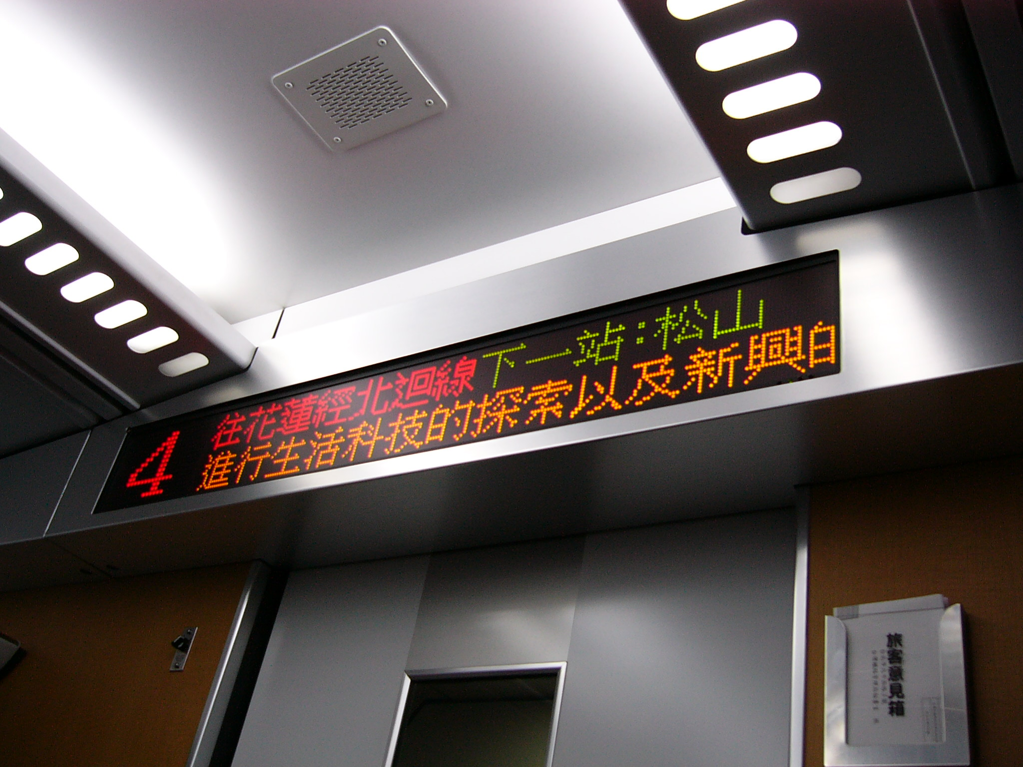 台鐵TEMU1000型電聯車車內LED顯示器。